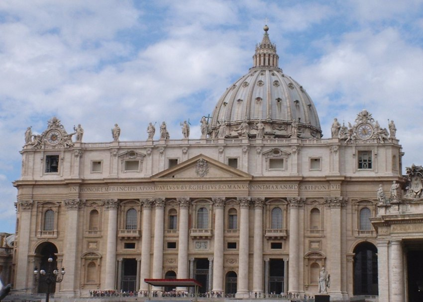 Gros plan sur la porte latérale de la cathédrale St-Pierre à Rome